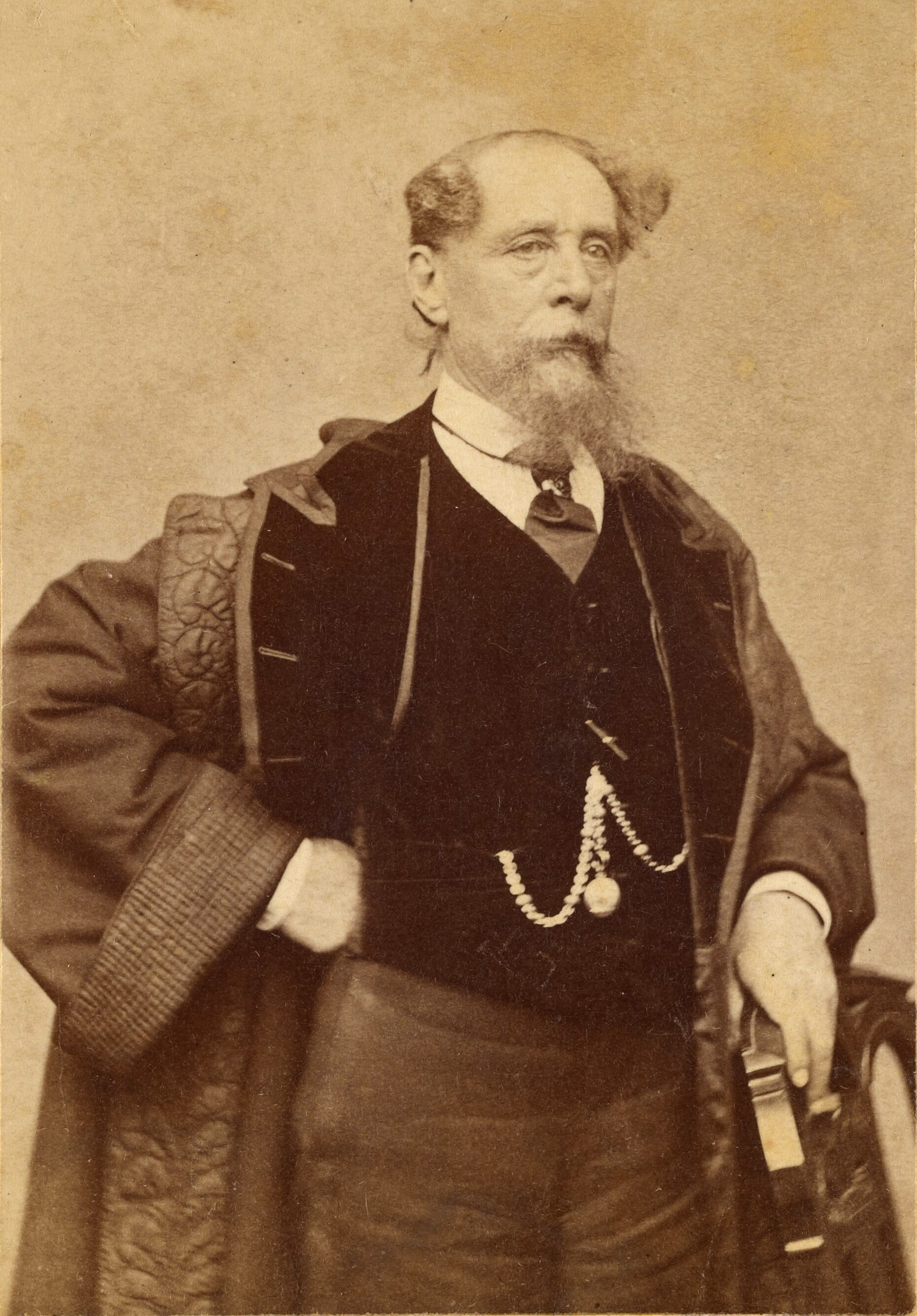 Charles Dickens (1812-1870)